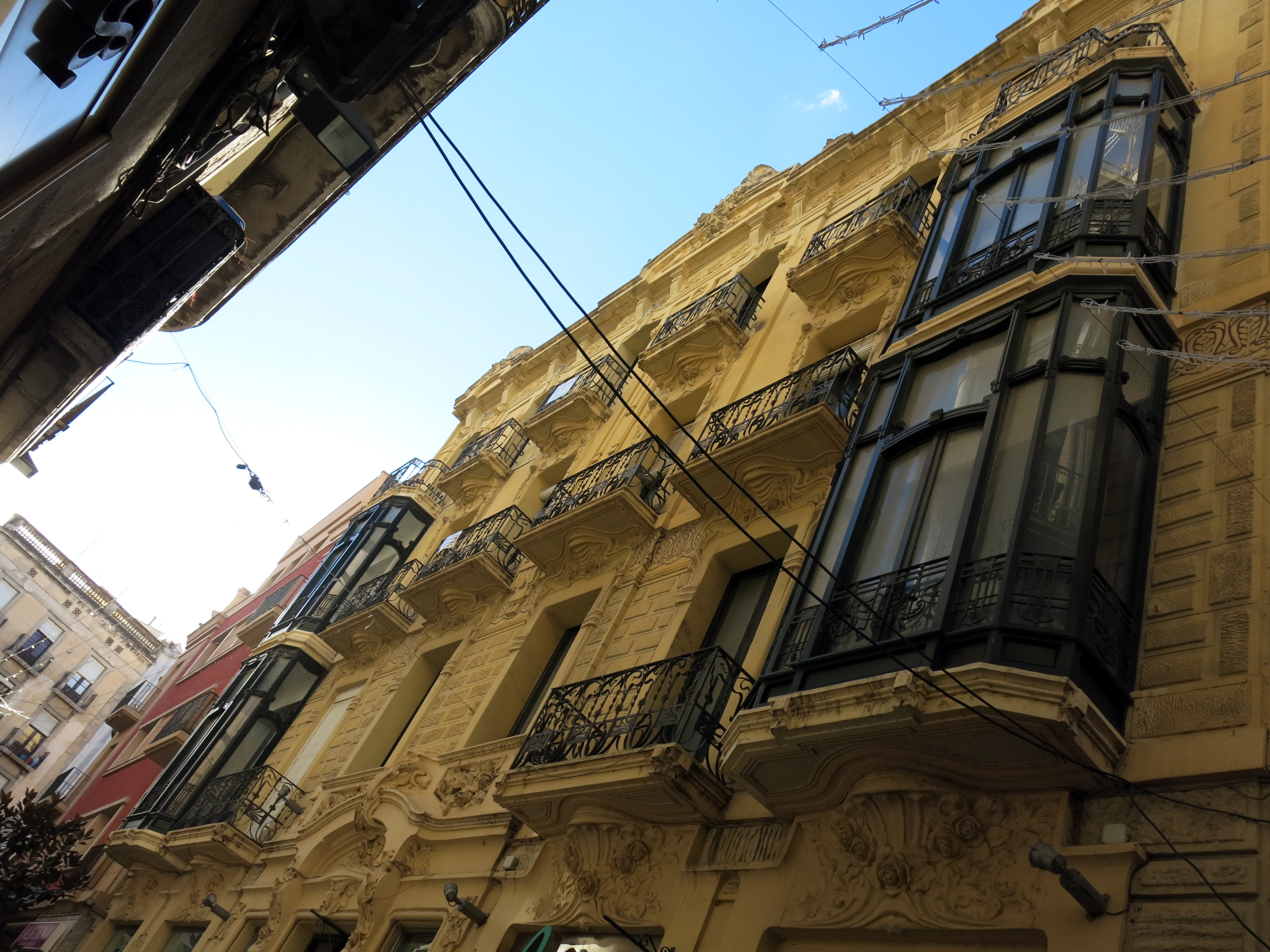 Hotel Siboni (Tortosa)